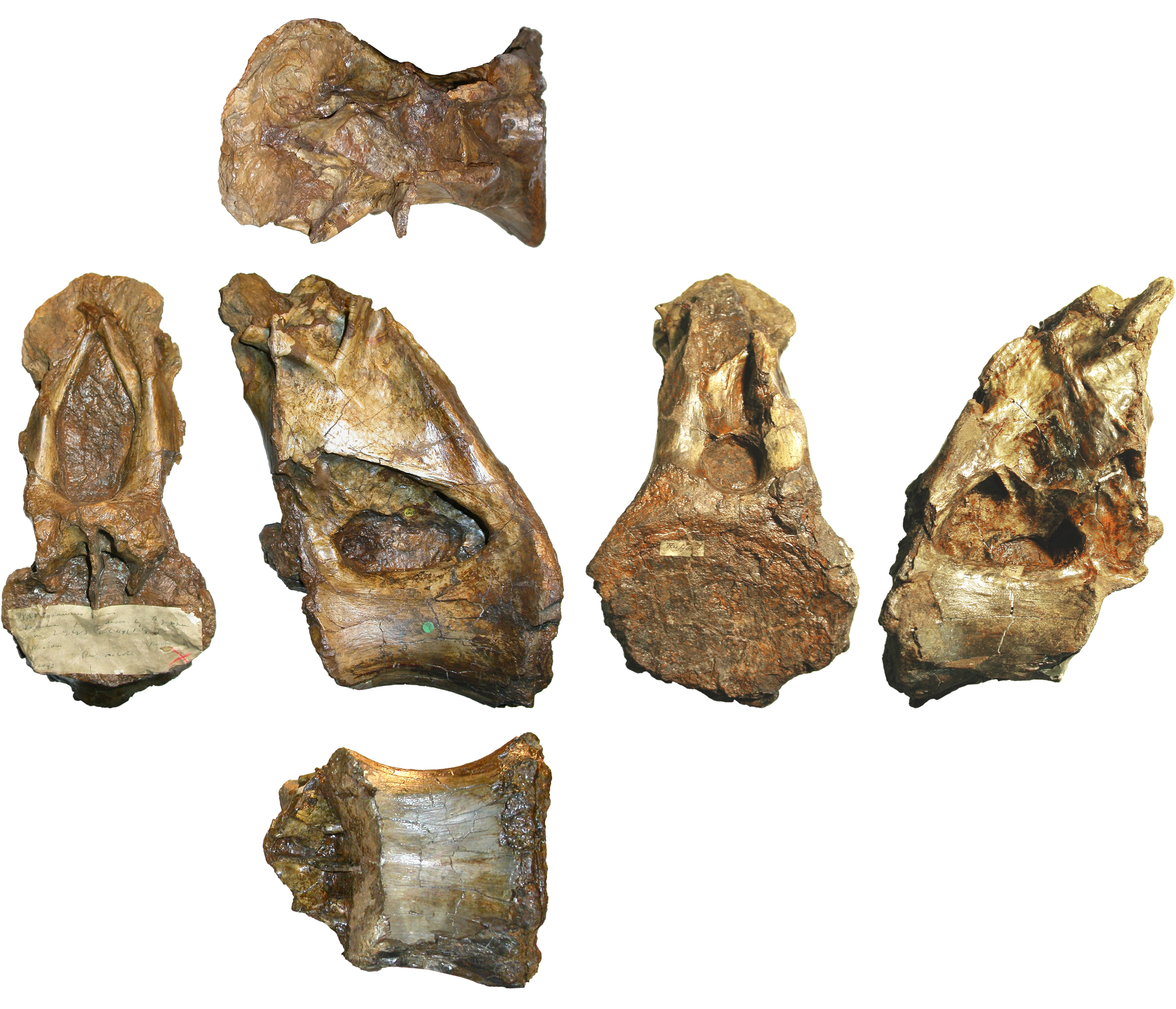 Xenoposeidon proneneukos holotype vertebra NHM R2095.